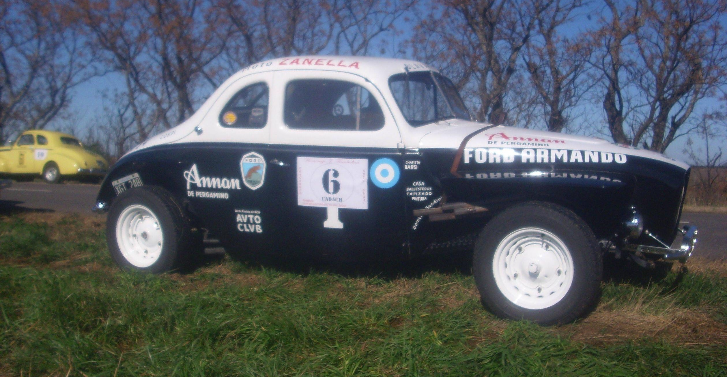 Imagen editada